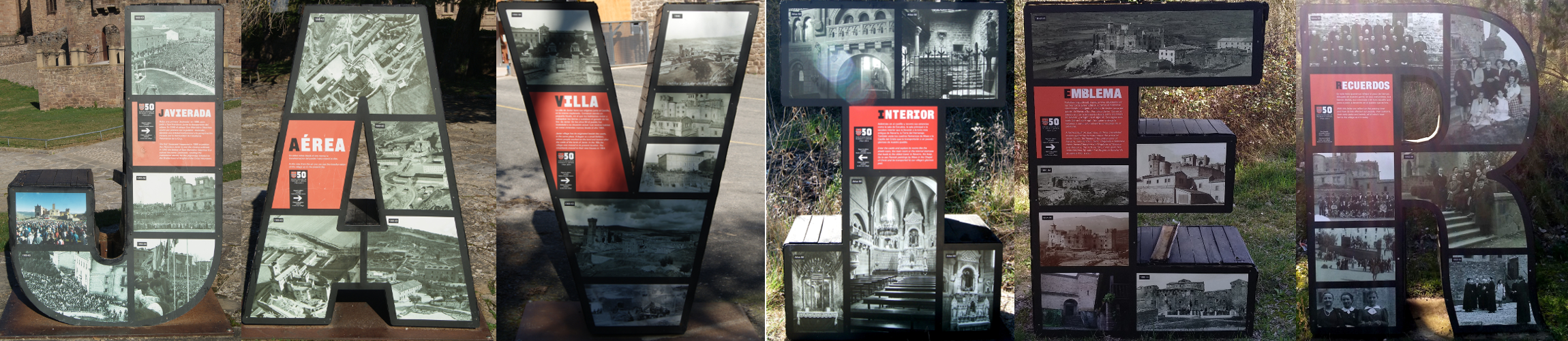 Composición con cada letra panel colocada en Javier, entre el castillo y el pueblo